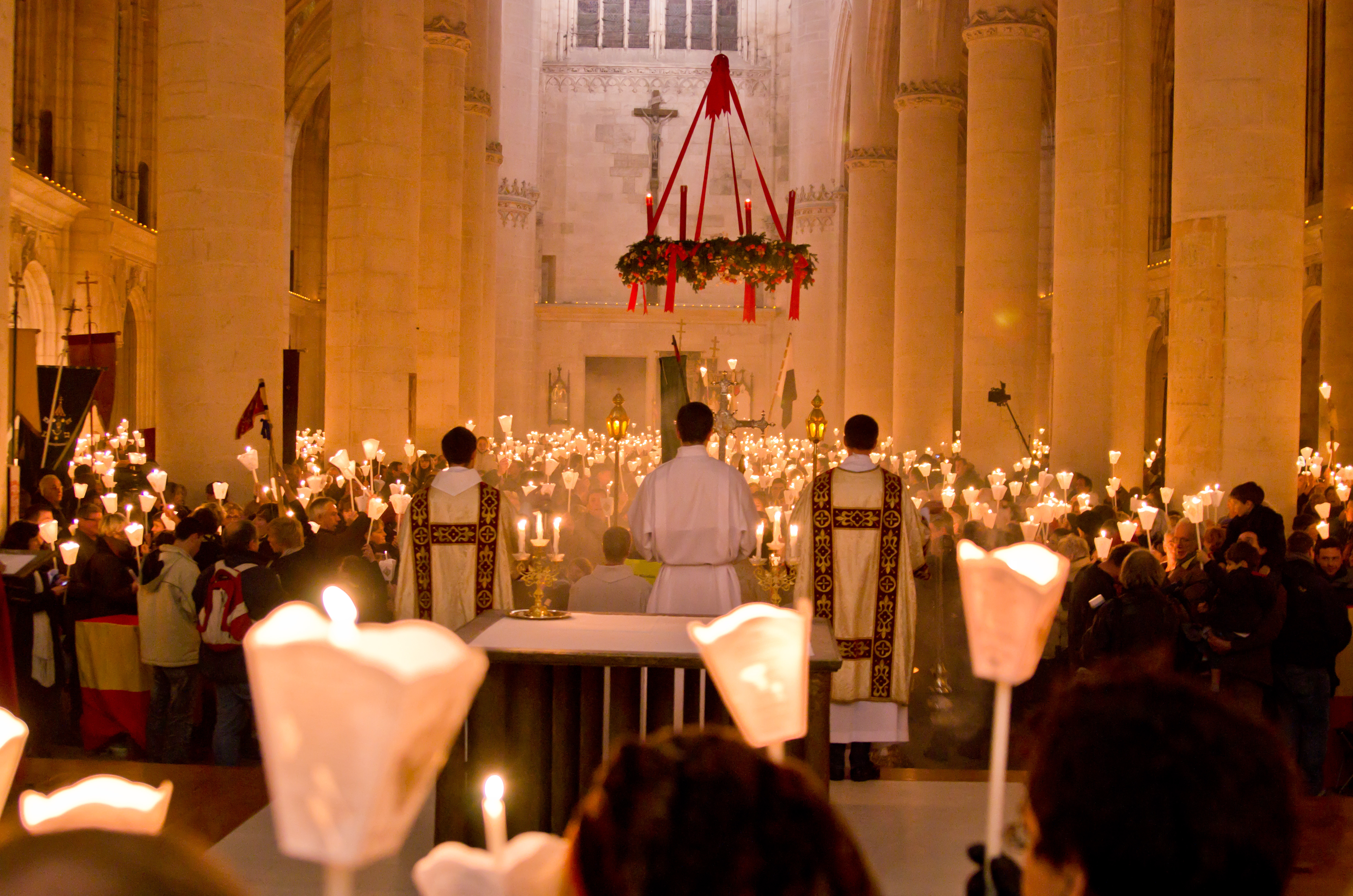 La procession annuelle de Saint Nicolas en la basilique de Saint-Nicolas-de-Port (2011)